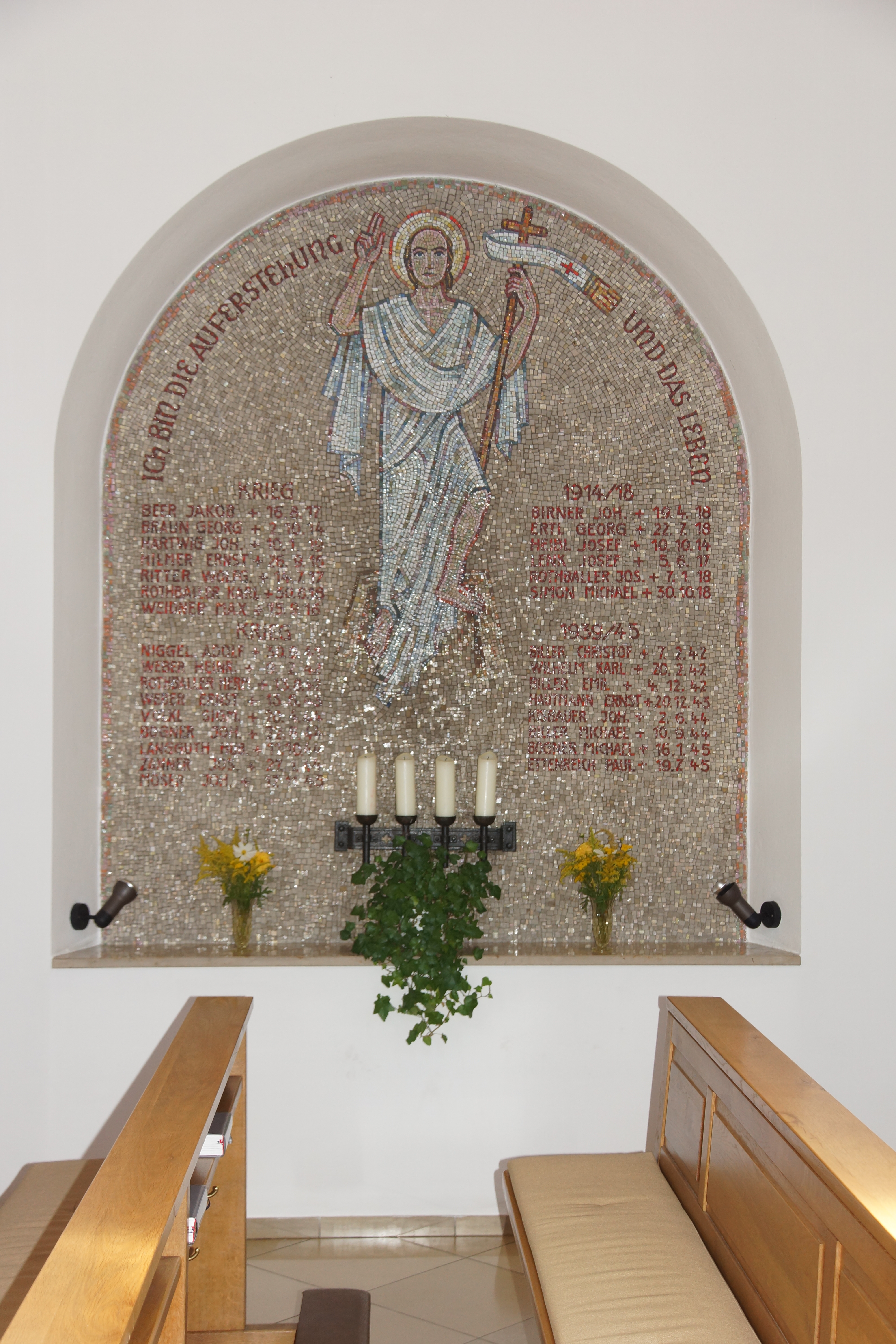 Heilige Familie - Weiherhammer